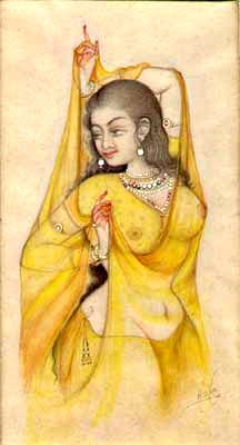 Choli art